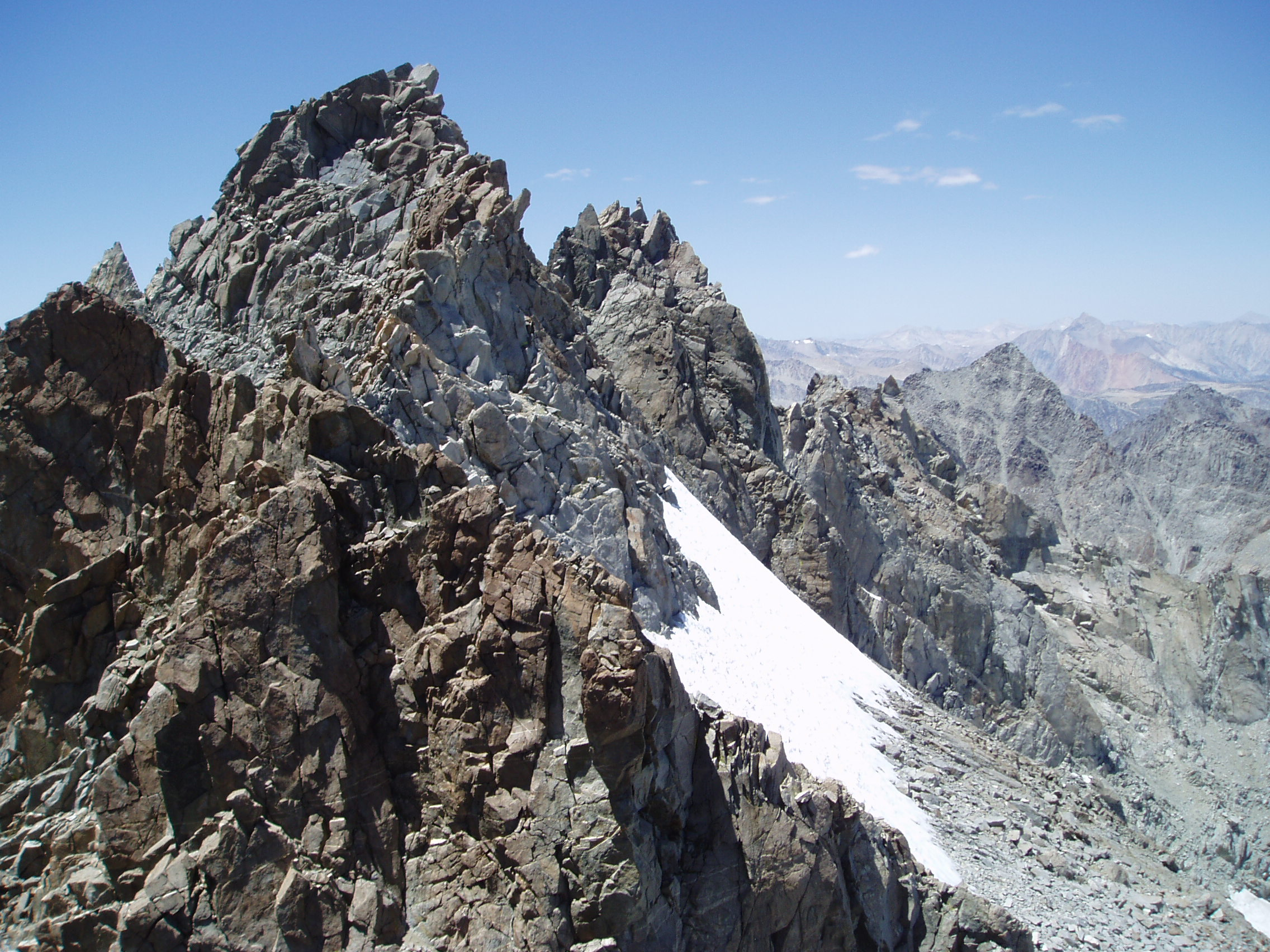 Palisade Crest